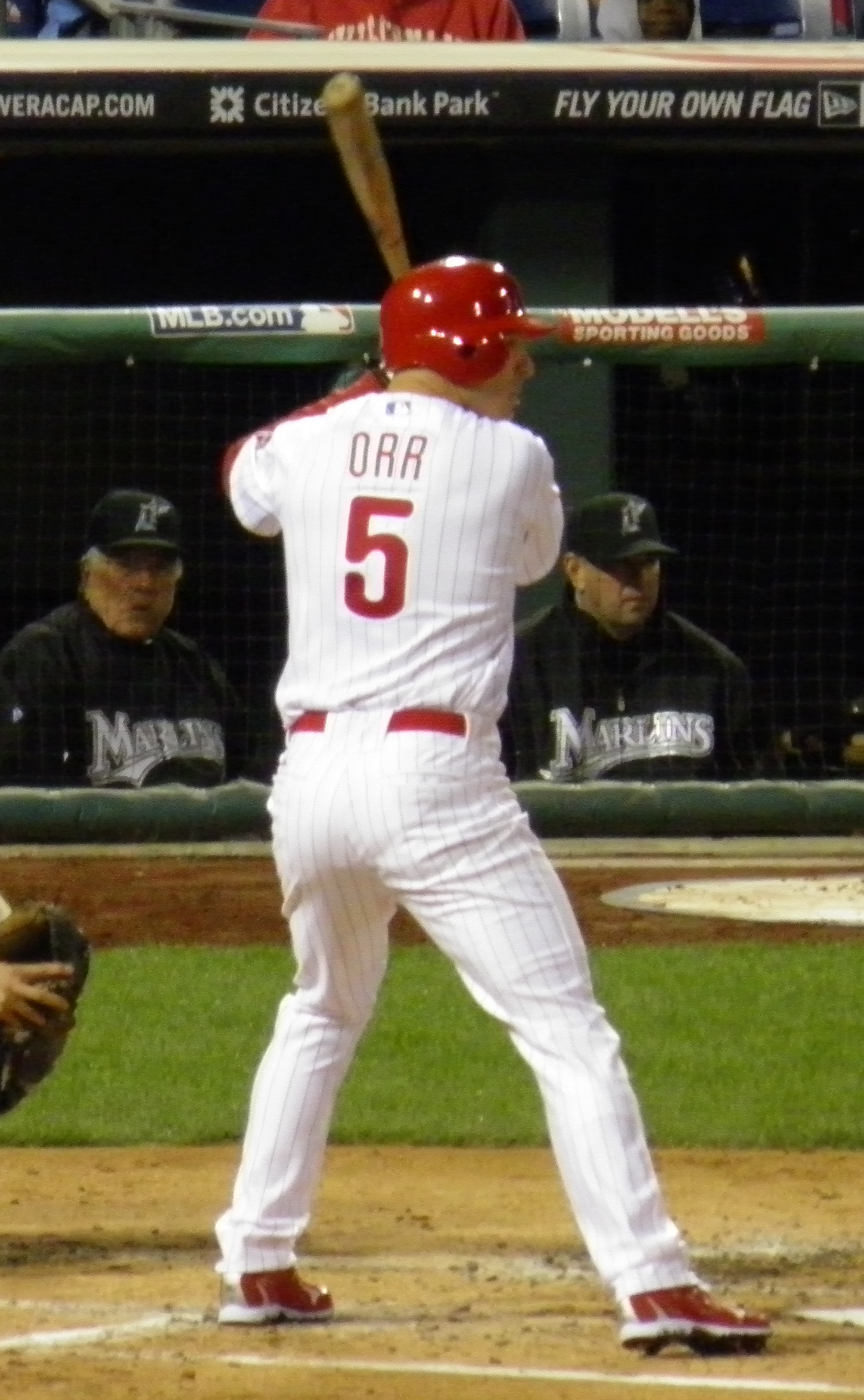 Pete Orr